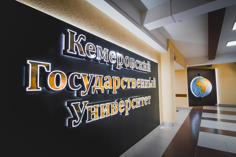 КемГУ административный этаж